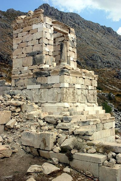 Heroon